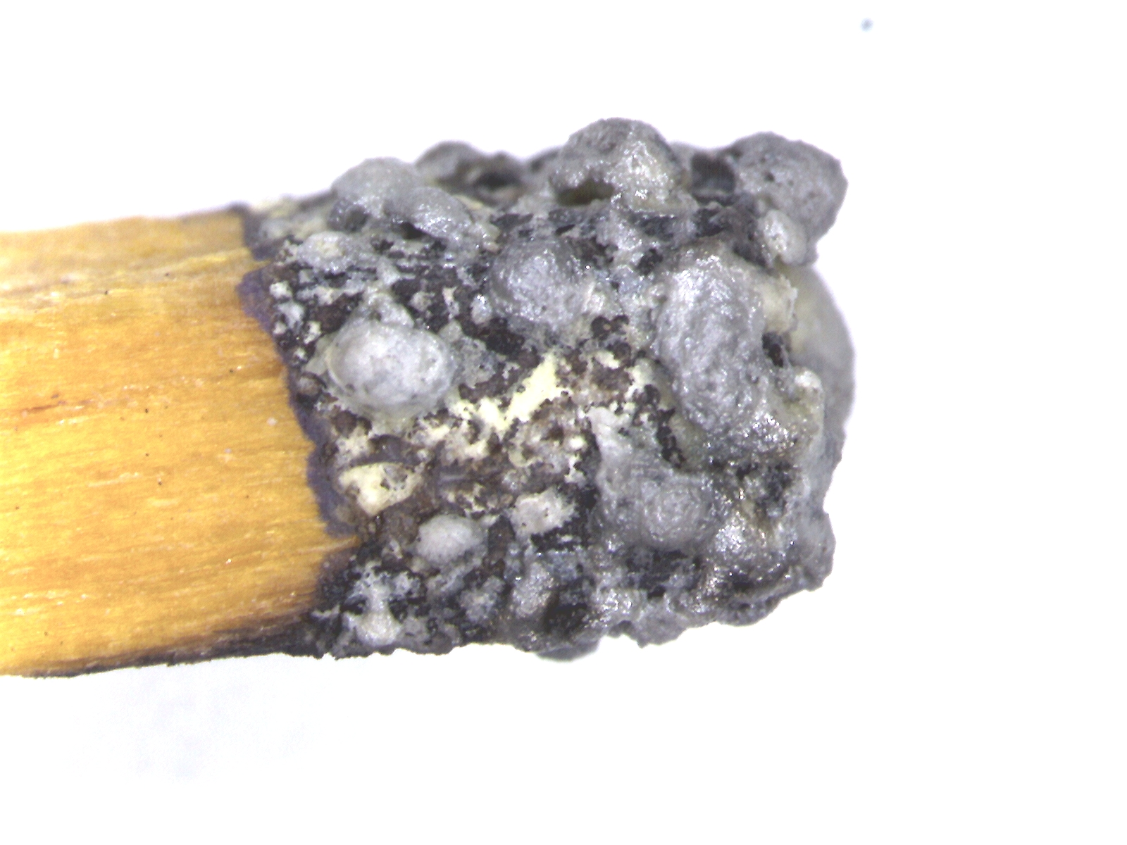 Kopf eines abgebrannten Zündholzes bei 70facher Vergrößerung